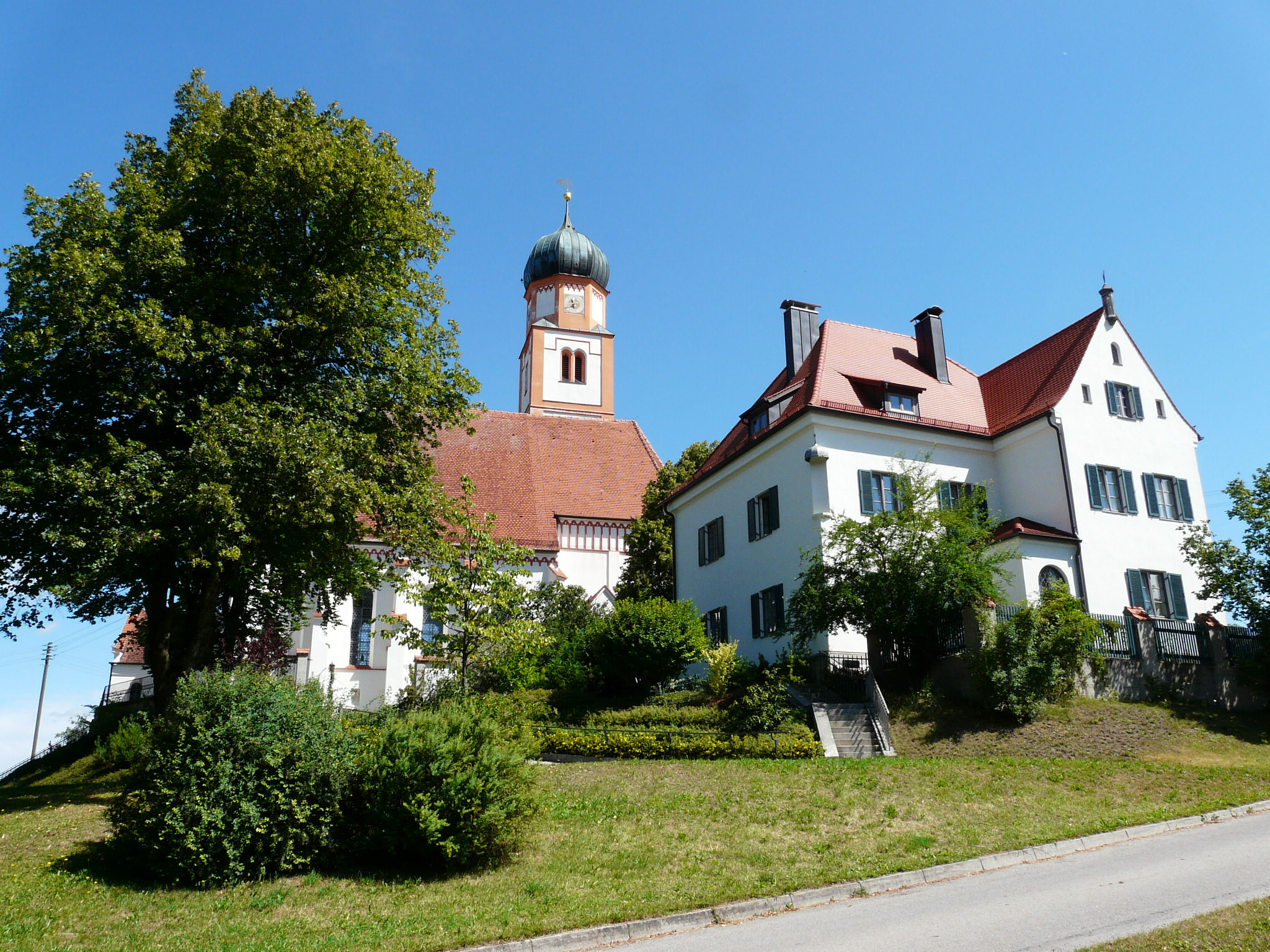 Pfarrhaus und Kirche St. Peter und Paul in Prittriching